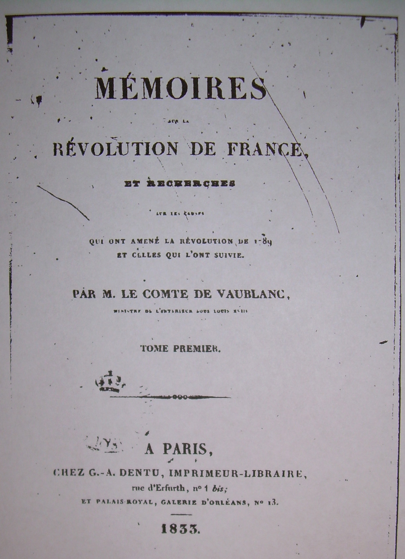 mémoires du comte de vaublanc